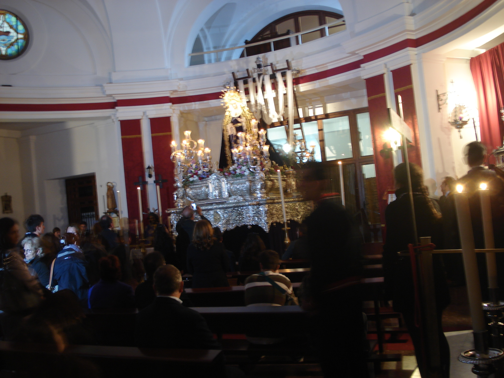 Iglesia de San Pedro en Jerez de la Frontera